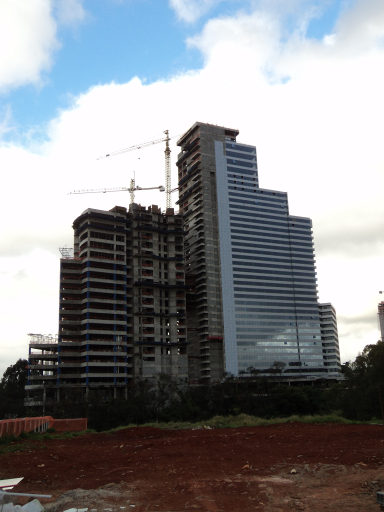 Construção do Brascan Century Plaza Green Valley em Alphaville